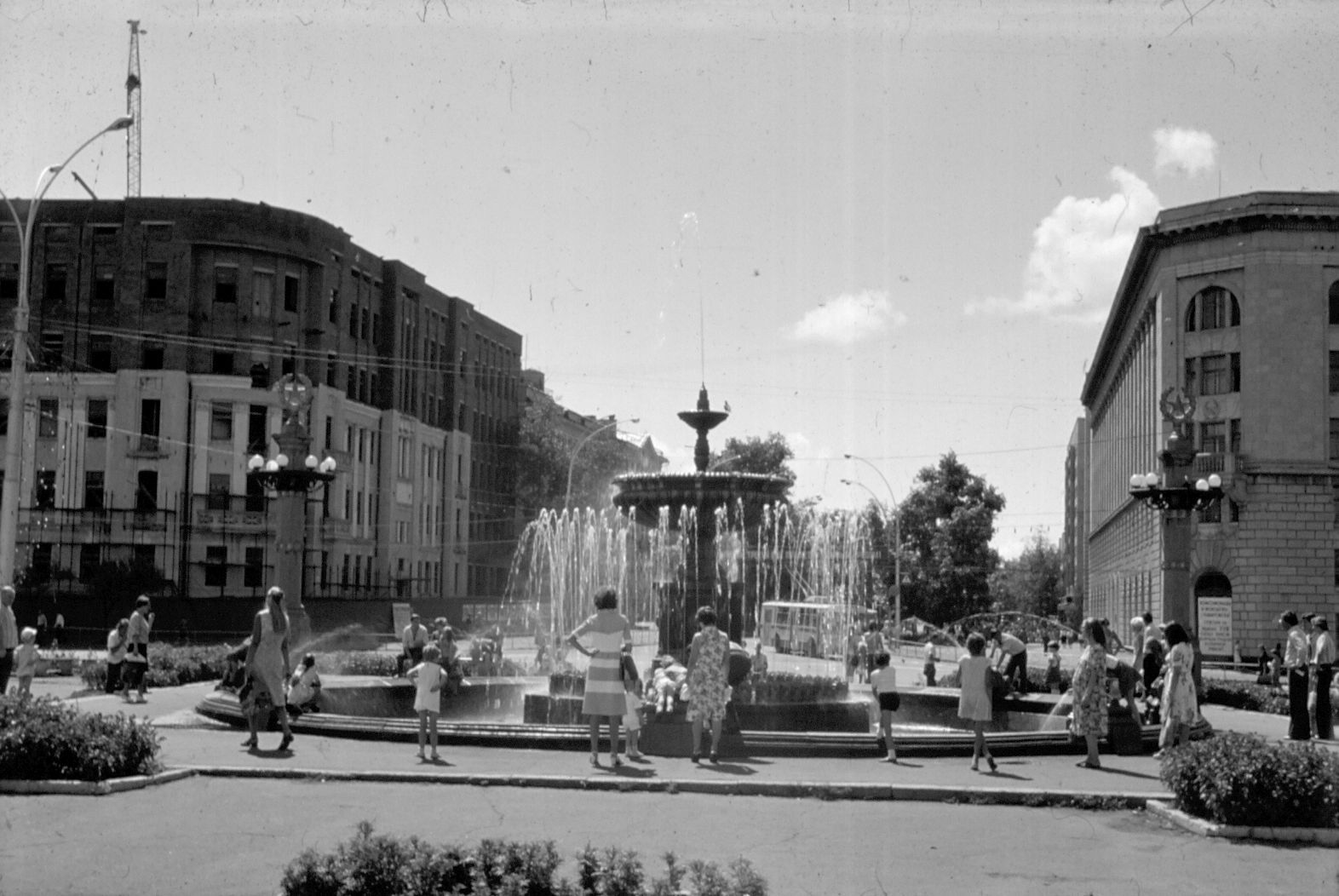 Хабаровск, площадь Ленина в 1978 году.